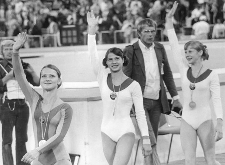 ADN-ZB-Kohls-30.8.1972-sche-München: XX. Olympische Sommerspiele. Wie schon im Mannschaftskampf, war auch das Mehrkampffinale ein Beweis für die Überlegenheit des Frauen-Turnens, der sozialistischen Länder. Medaillengeschmückt und überglücklich verlassen die Siegerinnen des glanzvollen Turniierereignisses, Karin Janz (DDR, Silber), Ludmilla Turistsschewa (Gold) und Tamara Lasakowitsch (Bronze, beide UdSSR, v..l.) die Wettkampfstätte.